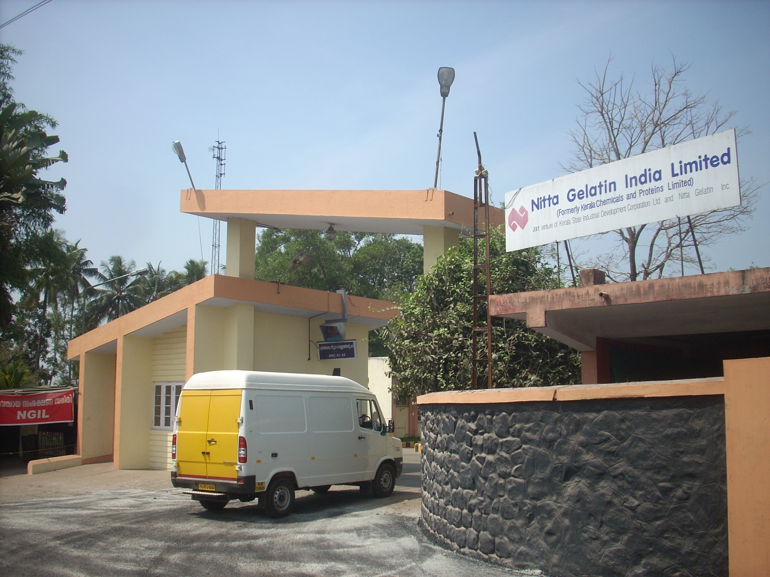 നീറ്റ ജലാറ്റിന്‍ ഇന്ത്യ ലിമിറ്റഡ് (എന്‍.ജി.ഐ.എല്‍.), കാതികൂടം